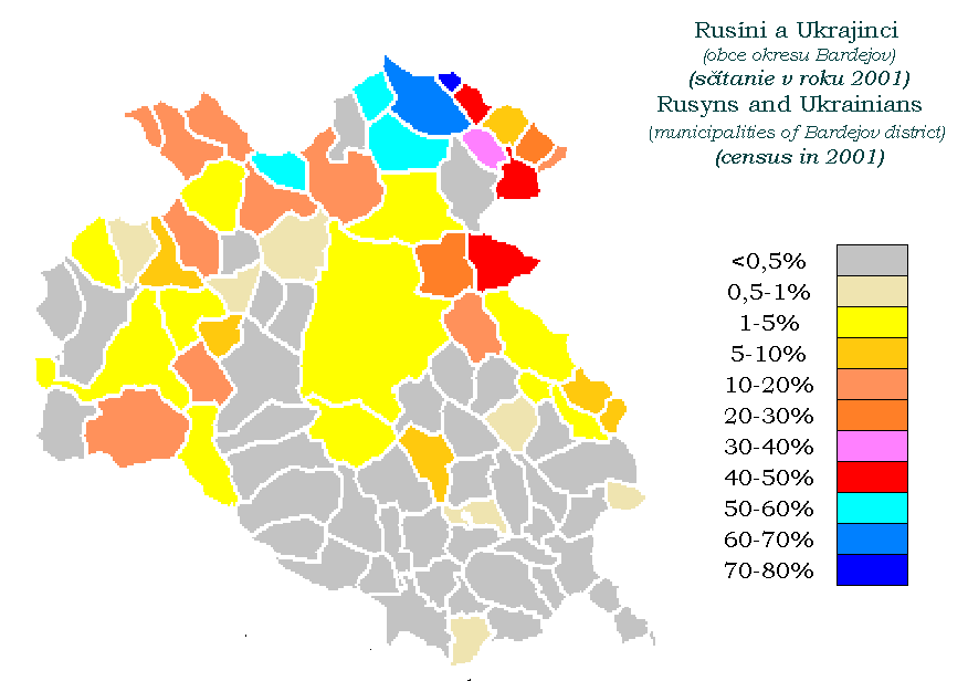 Rusíni a Ukrajinci v %